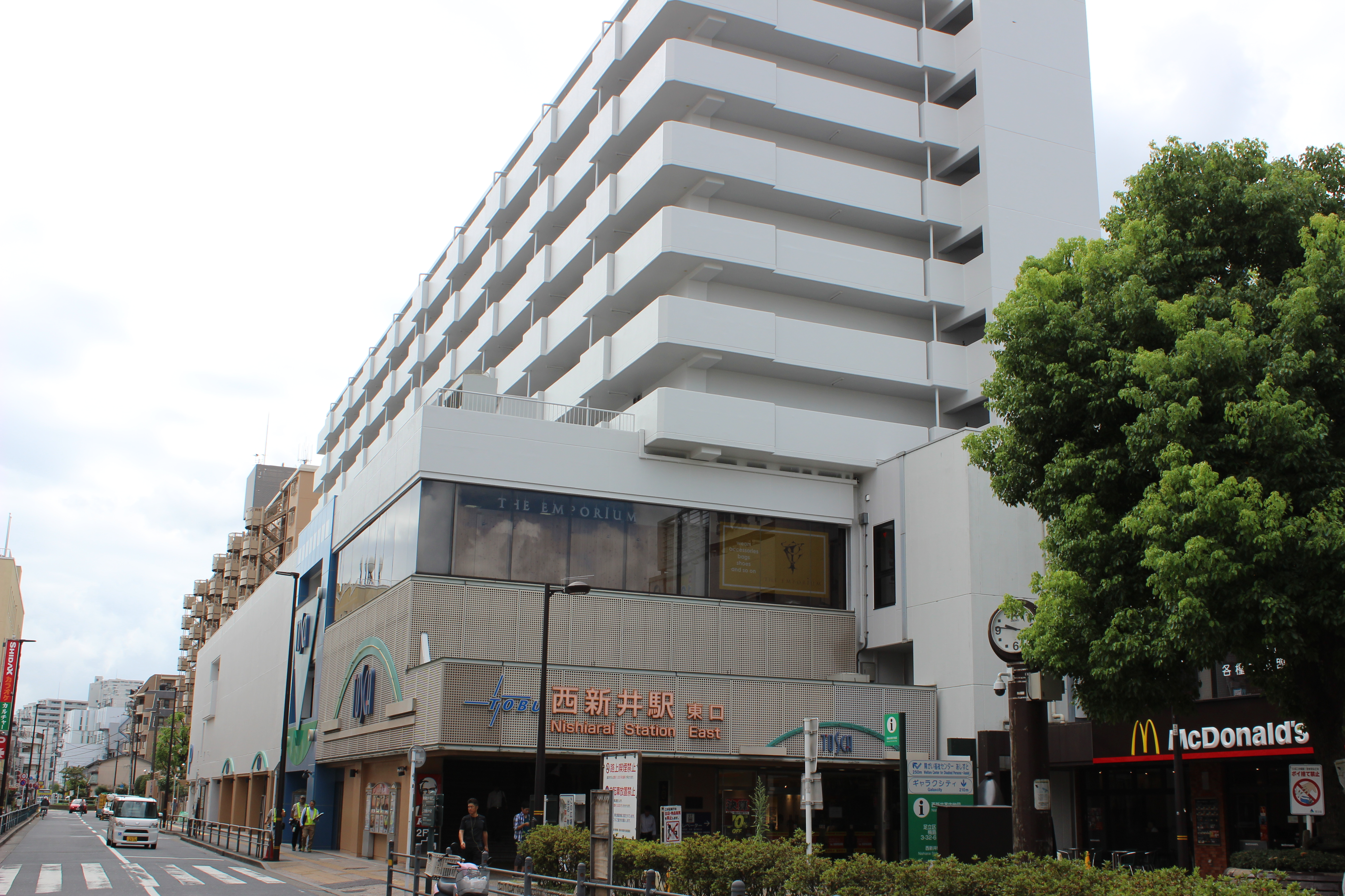 西新井駅東口